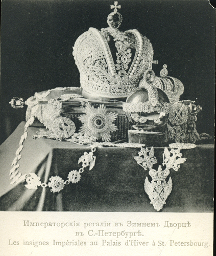 Открытка